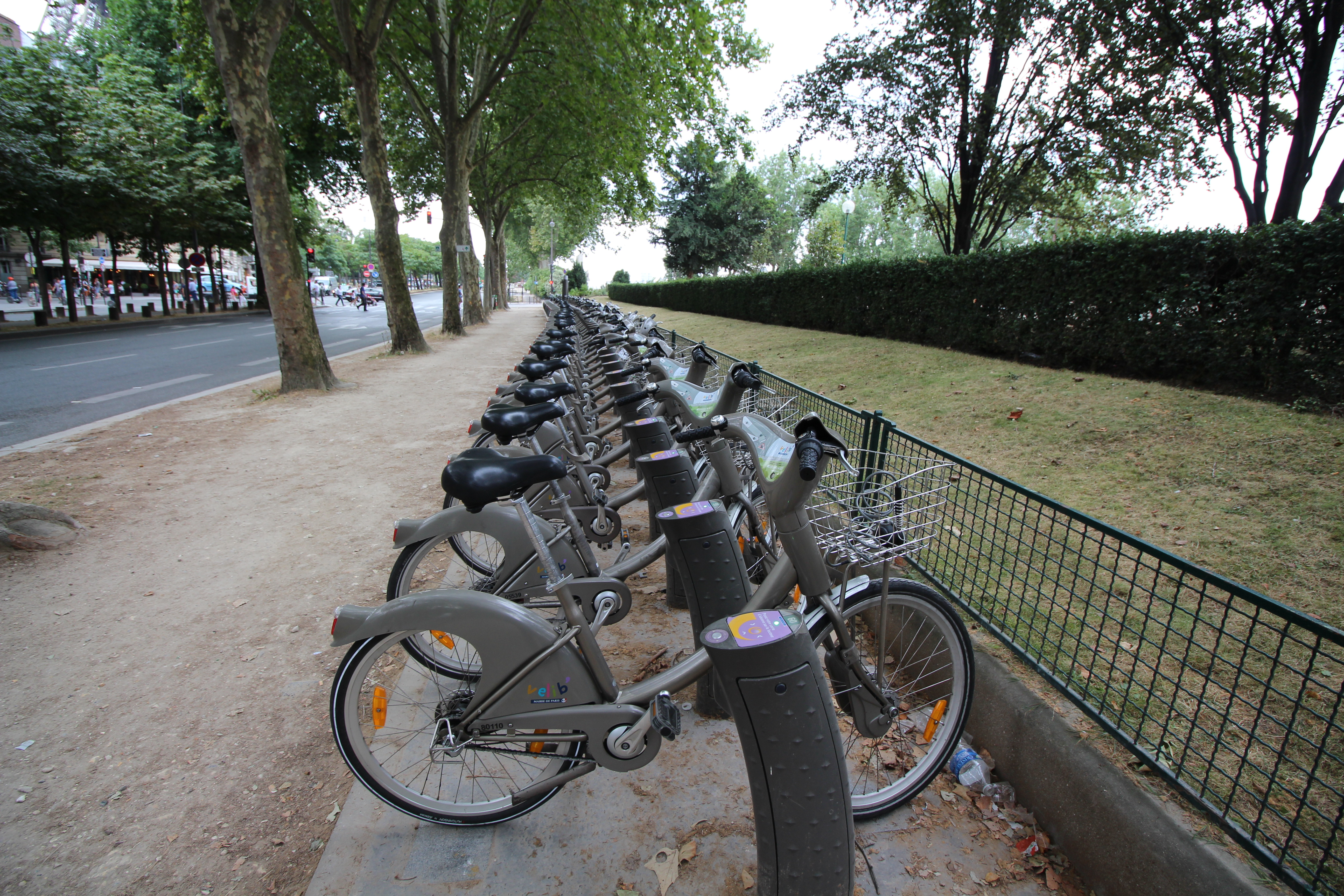 Bysykler i Paris, Frankrike